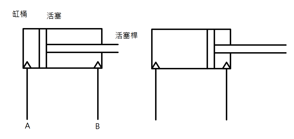 中文（台灣）: 液壓缸